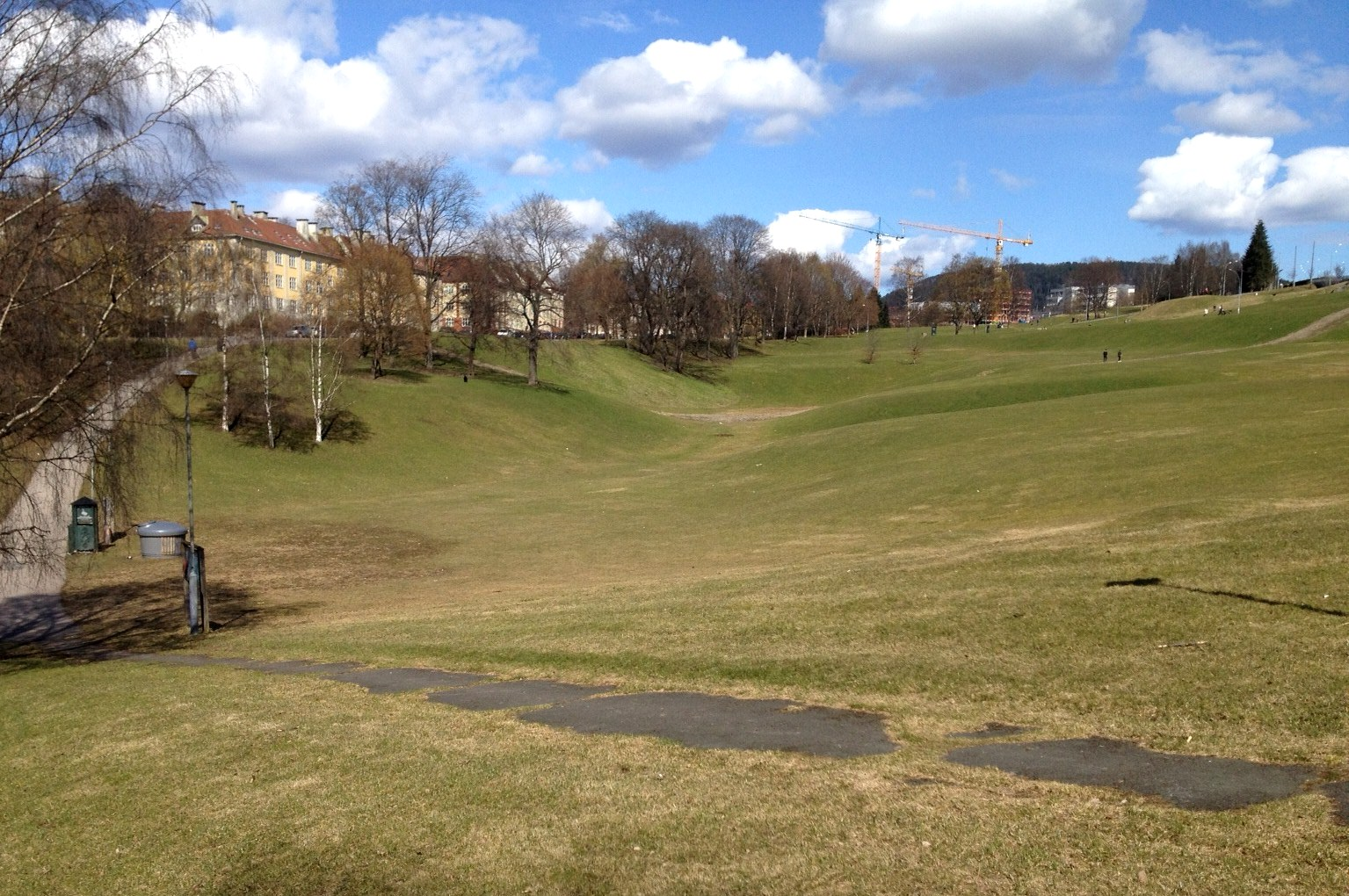 Torshovdalem, Oslo